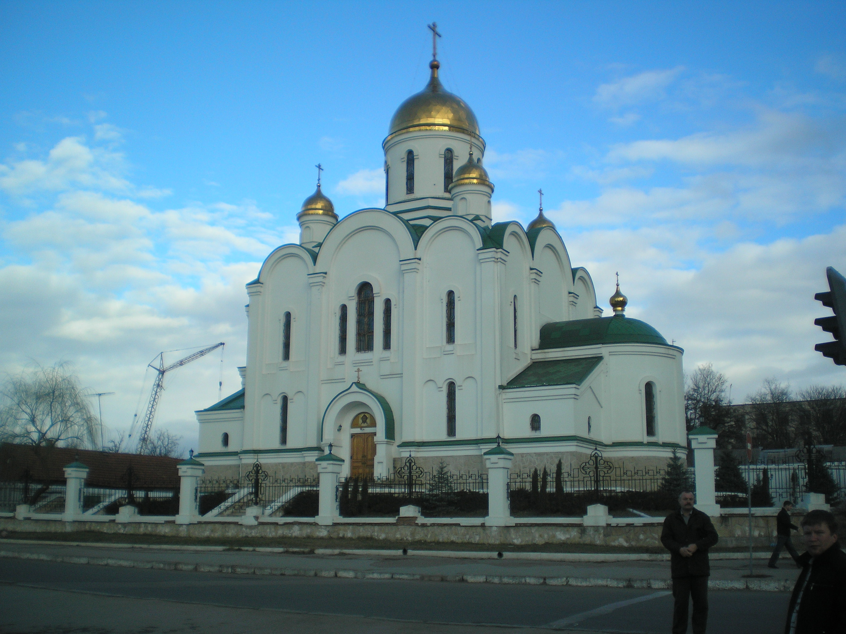 Кафедральный собор Рождество Христова в Тирасполе (ПМР)